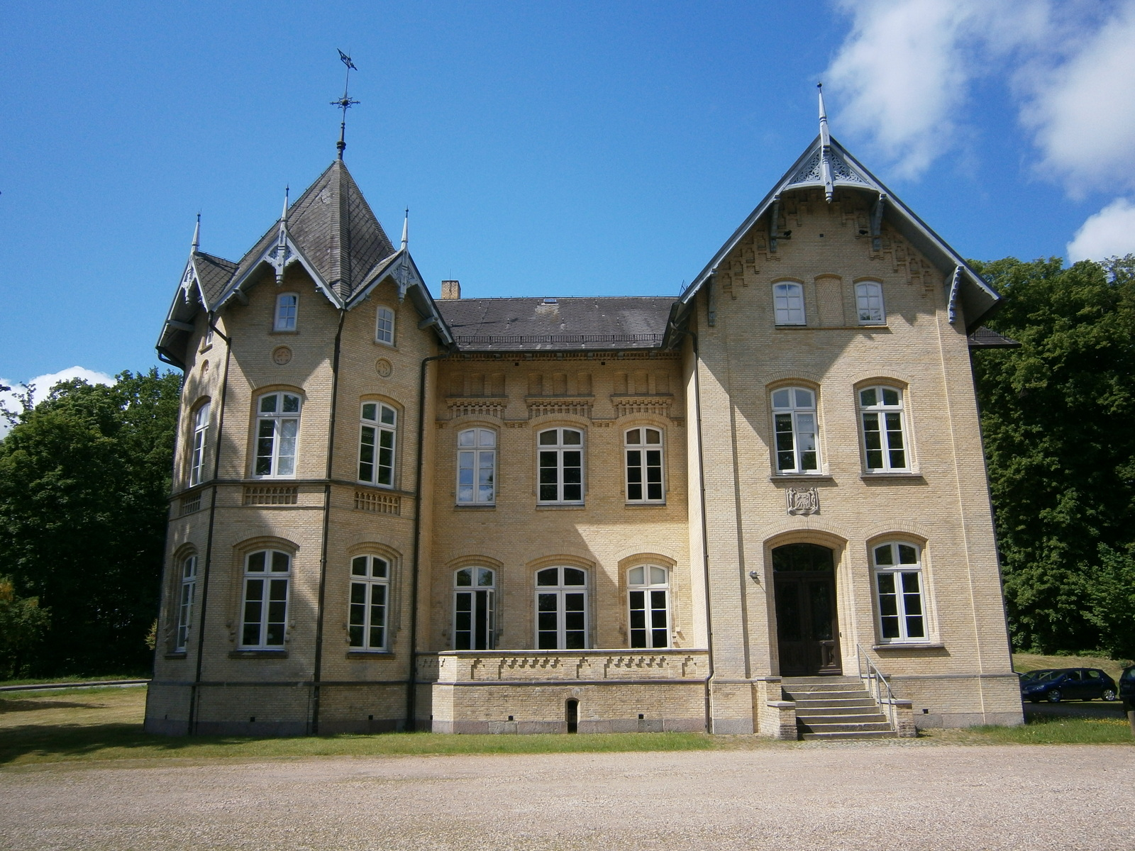 Schloss Annettenhöh, Brockdorff-Rantzau-Straße 70, 24837 Schleswig, today housing the Archäologisches Landesamt. Schleswig-Holstein